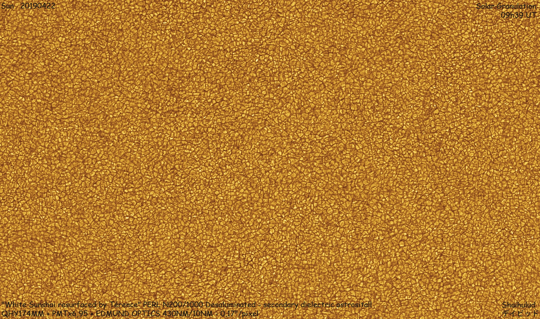 Solar Granulation (color version)